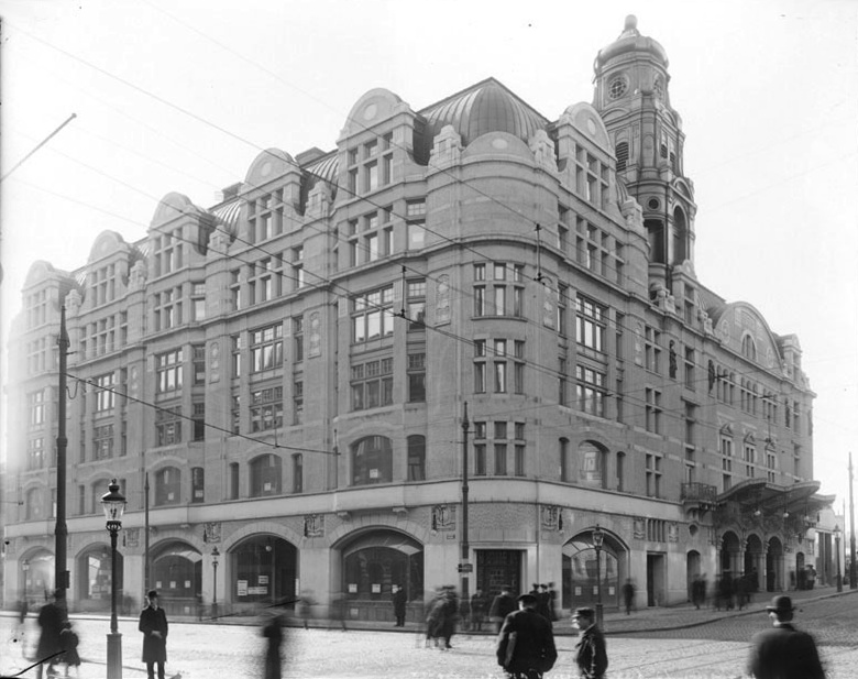 Kungsbropalatset och Oscarsteatern, Vasagatan 15-17 i hörnet av Kungsgatan, kvarteret Hasseln